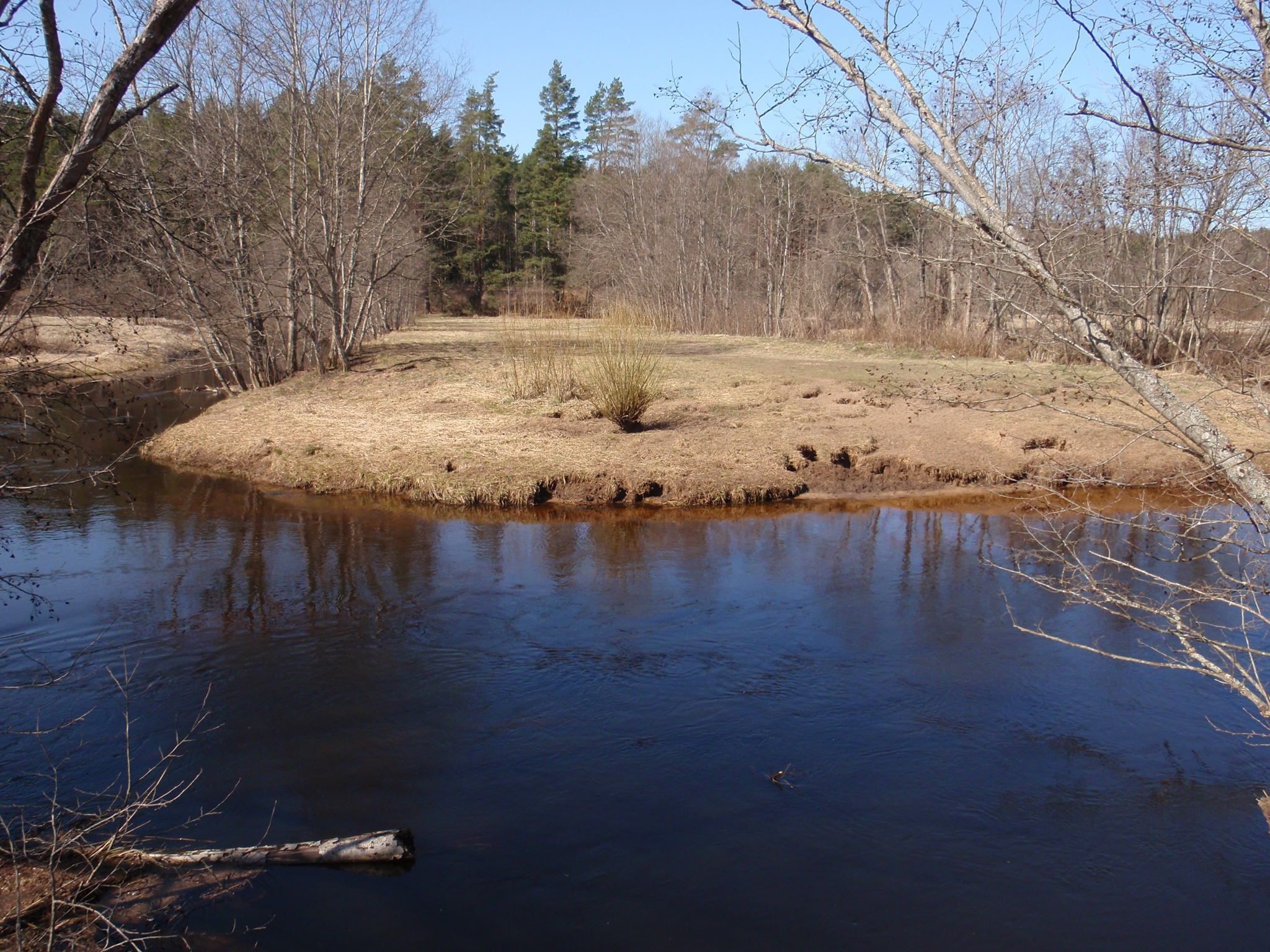 Ahja jõe käänak Eoste hoiualal